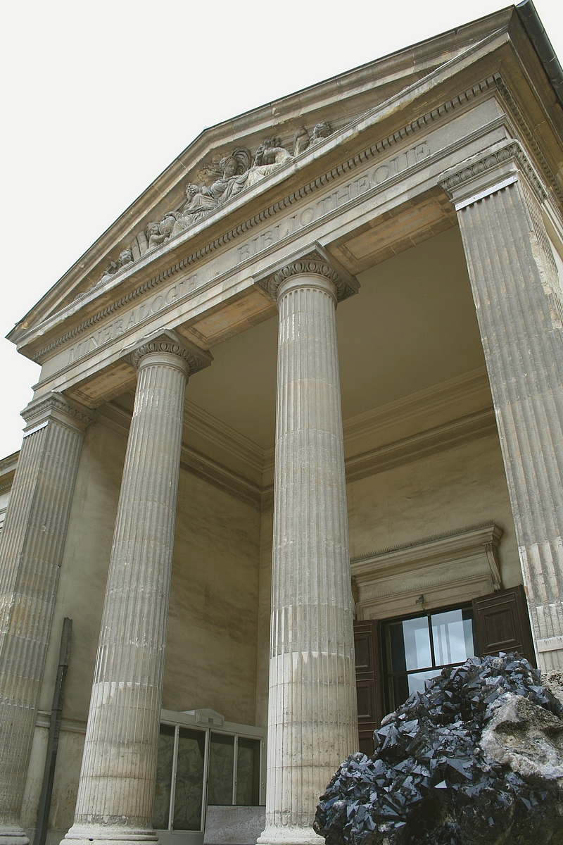 Péristyle et fronton de l'aile droite de la galerie de Minéralogie et de Géologie au Jardin des plantes, dans le 5e arrondissement de la ville de Paris en France. Les mots « Minéralogie » et « Bibliothèque » indiquent, l'un l'accès aux collections permanentes de minéralogie, l'autre que c'est ici que se trouvait autrefois (jusqu'en 1963) la bibliothèque centrale du Muséum.